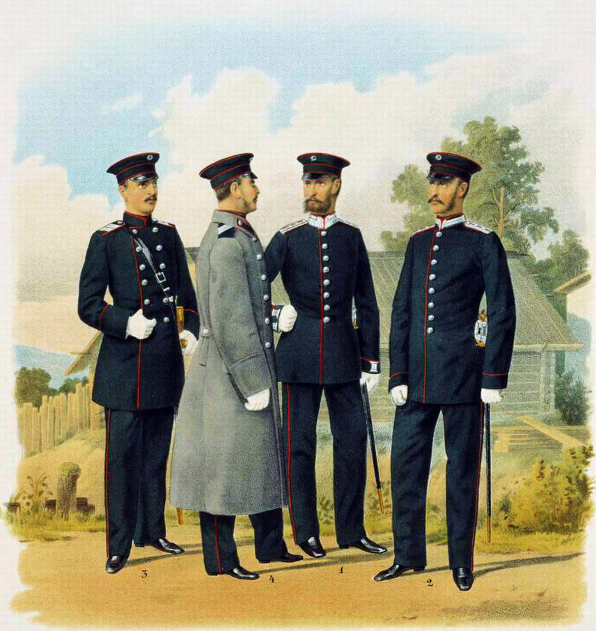 Военно-Медицинские чиновники и Воспитанники Императорской Военно-Медицинской Академии. 1. Фармацевт. 2. Классный Фельдшер. 3. Студент и 4. Слушатель подготовительного курса Императорской Военно-Медицинской Академии в форме парадной и обыкновенной. ( прик. по воен. вед. 1885 г. № 194 и цирк. Глав. Штаба 1885 г. № 143 )